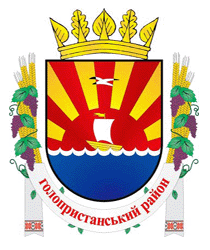 Герб Голопристанського района